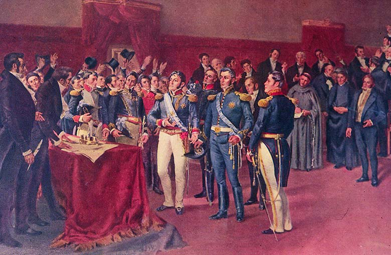 San Martín es recibido por el Congreso de Buenos Aires el 17 de mayo de 1818